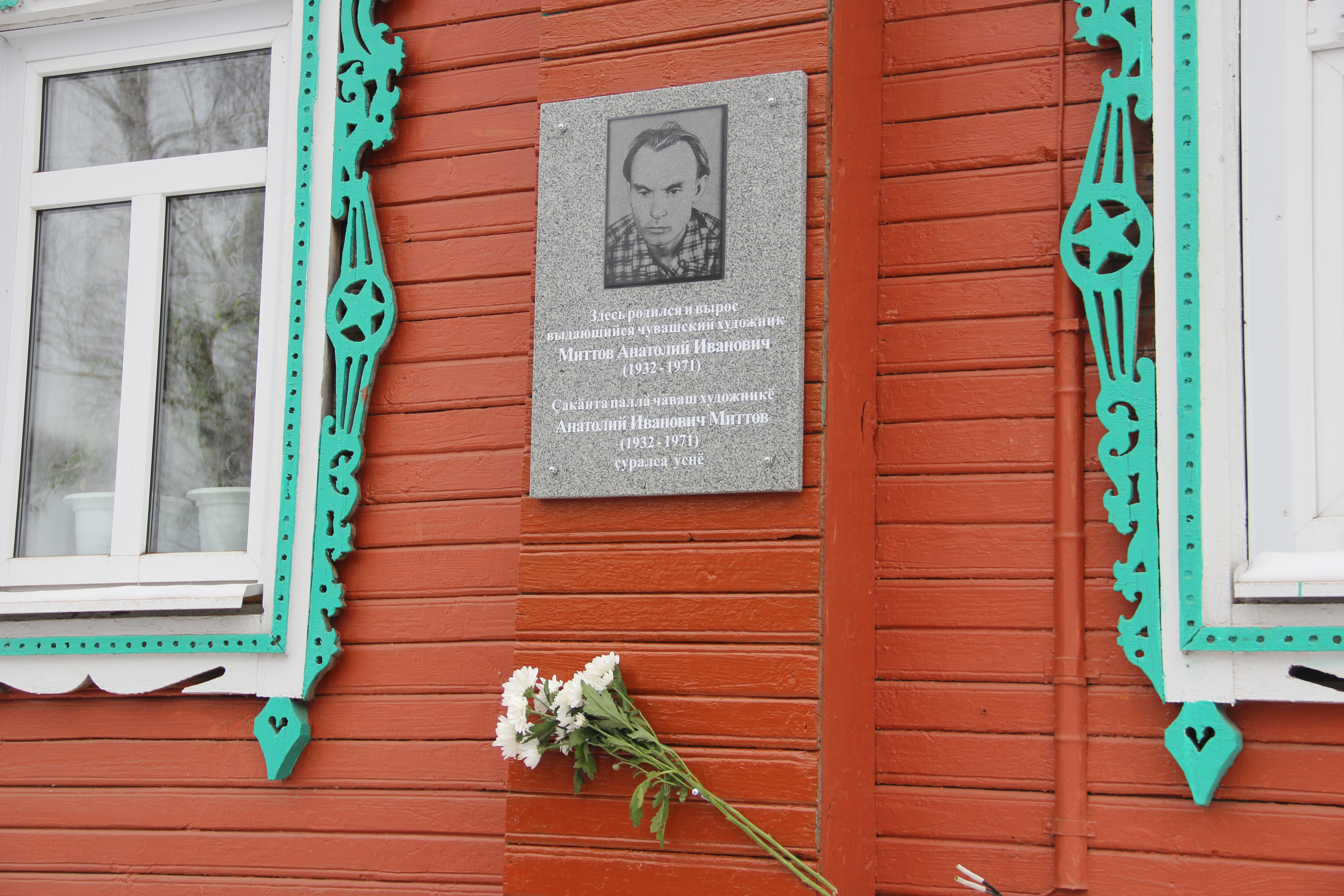 Памятная доска установлена на доме художника, в родном селе Тобурданово Канашского района Чувашской Республики. Автор - скульптор, заслуженный художник Российской Федерации, народный художник Чувашии Владимир Нагорнов.